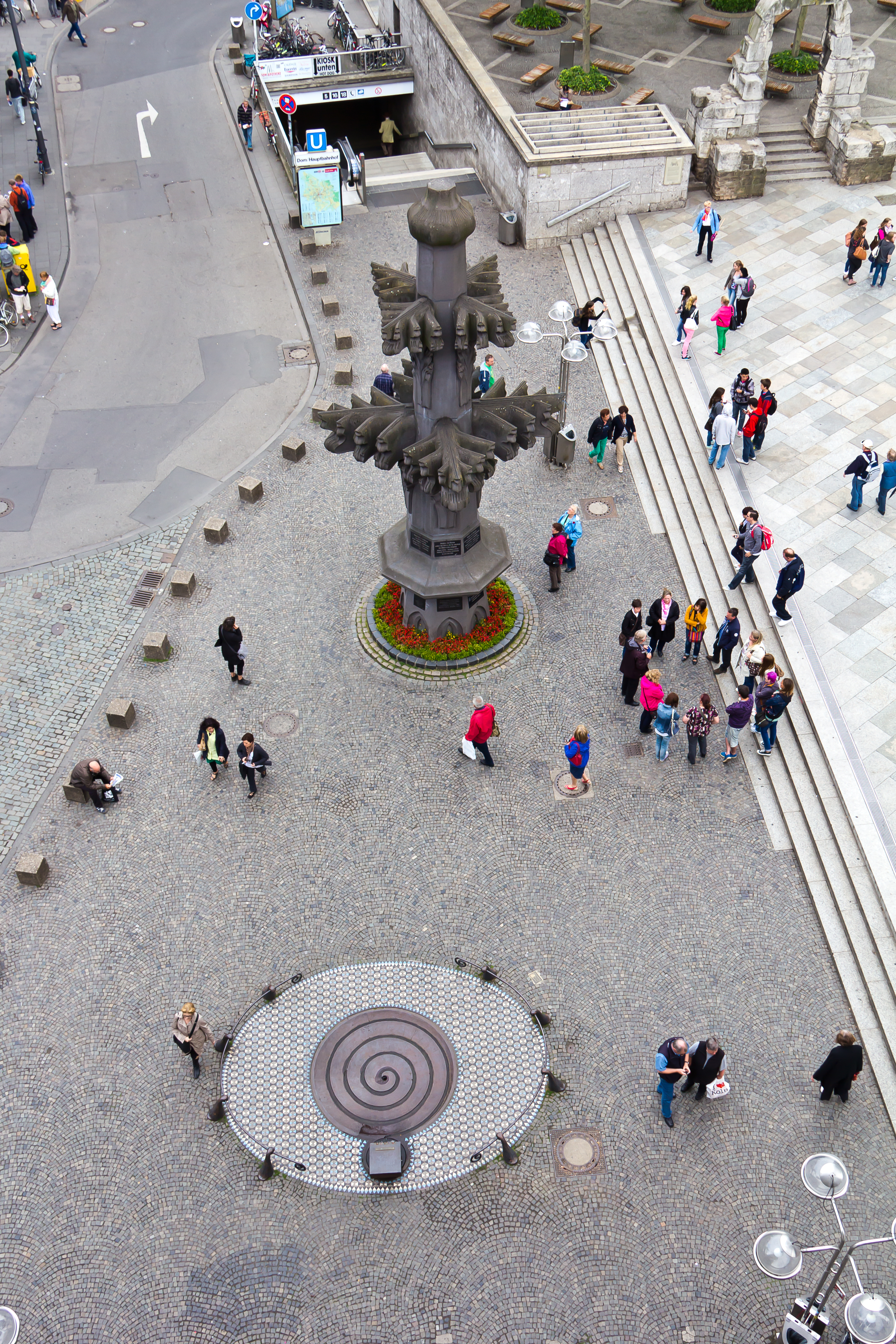 Kardinal-Höffner-Platz mit Nachbildung Kreuzblume und TaubenbrunnenThis is a photograph of an architectural monument.